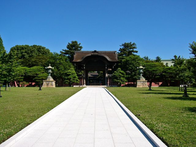 総持寺、向唐門（むかいからもん）